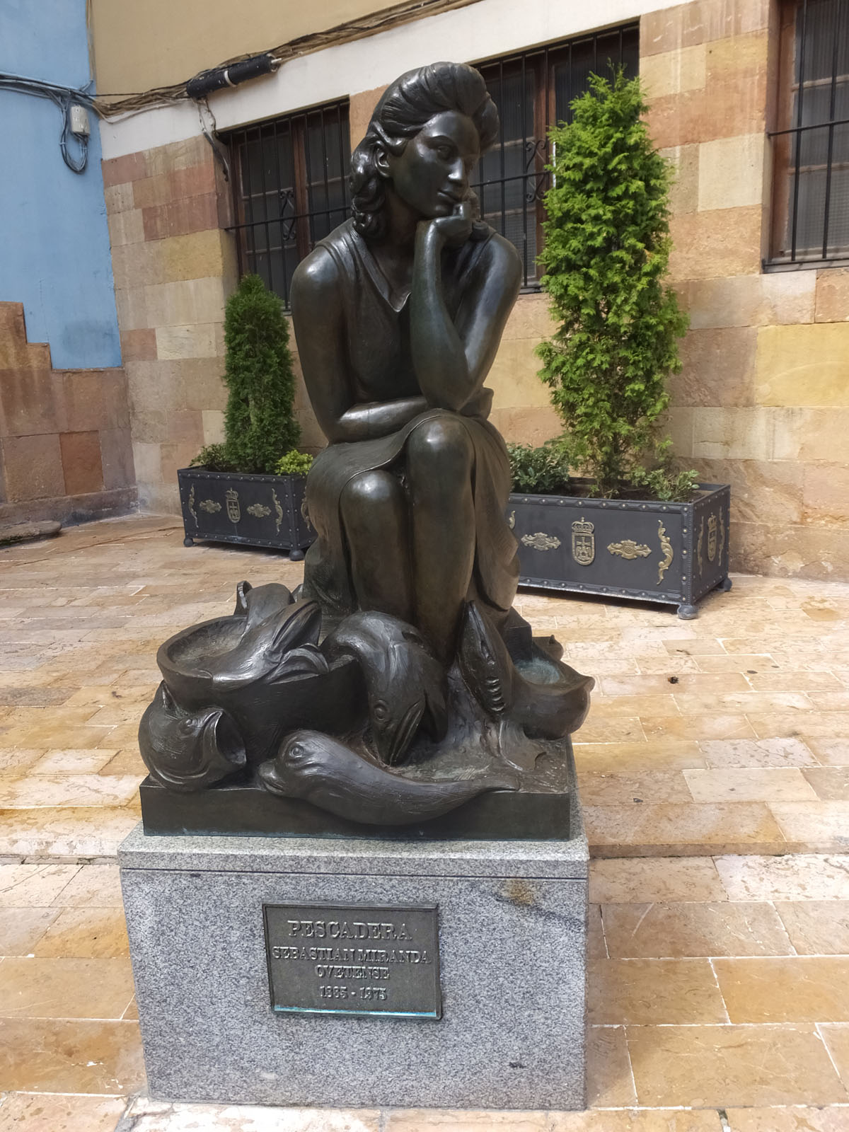 Pescadera